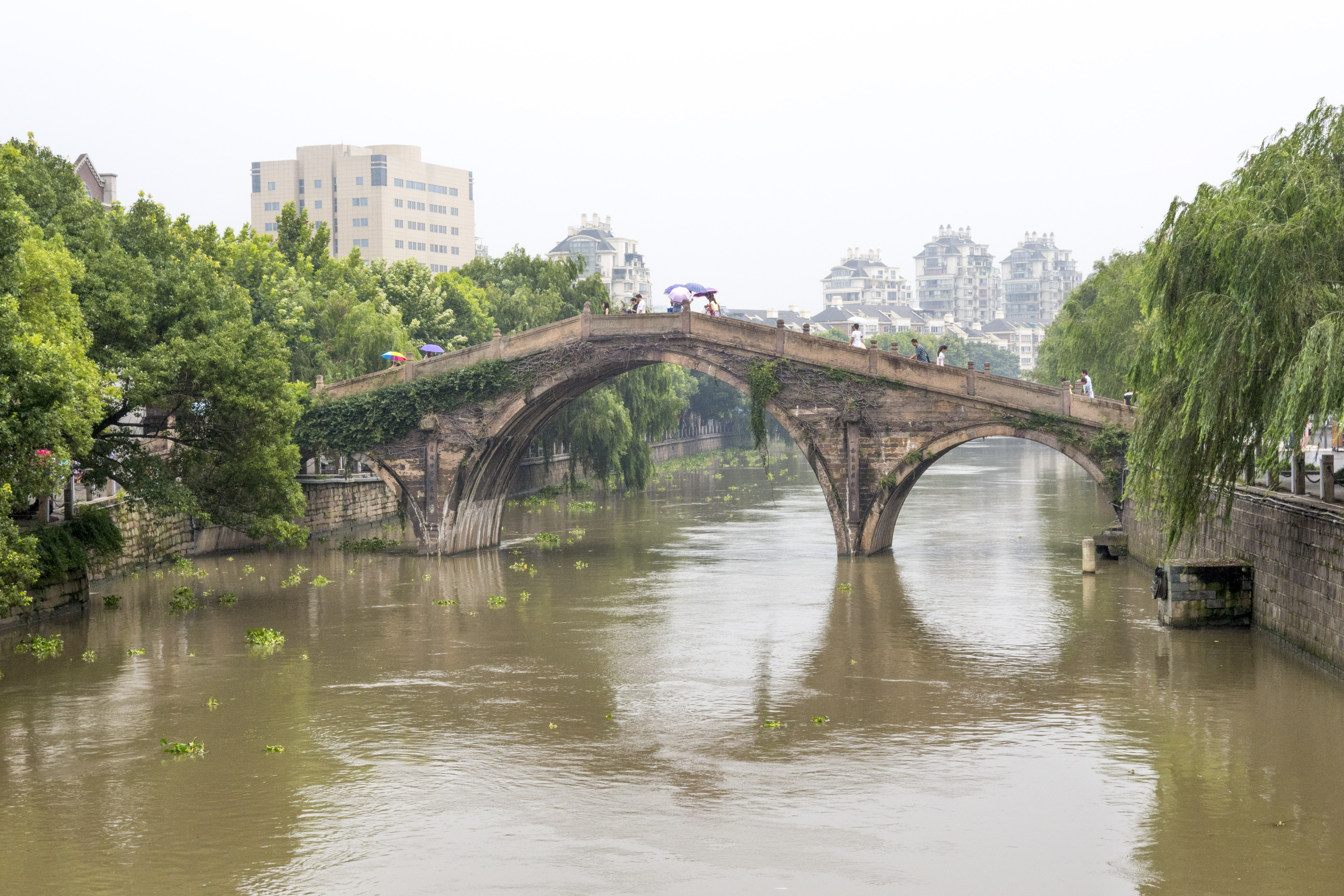 通济桥和舜江楼